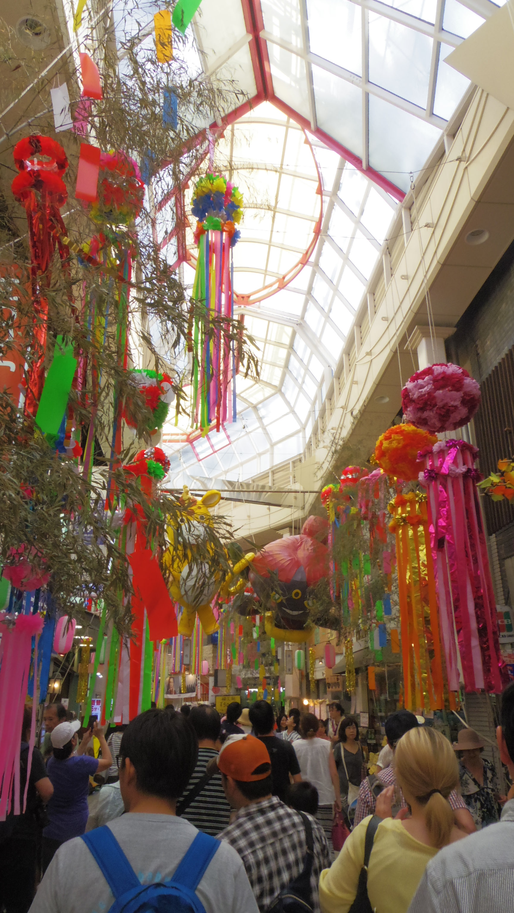 東京都杉並区阿佐ヶ谷で毎年8月に開かれる「阿佐谷七夕まつり」。写真は2015年。